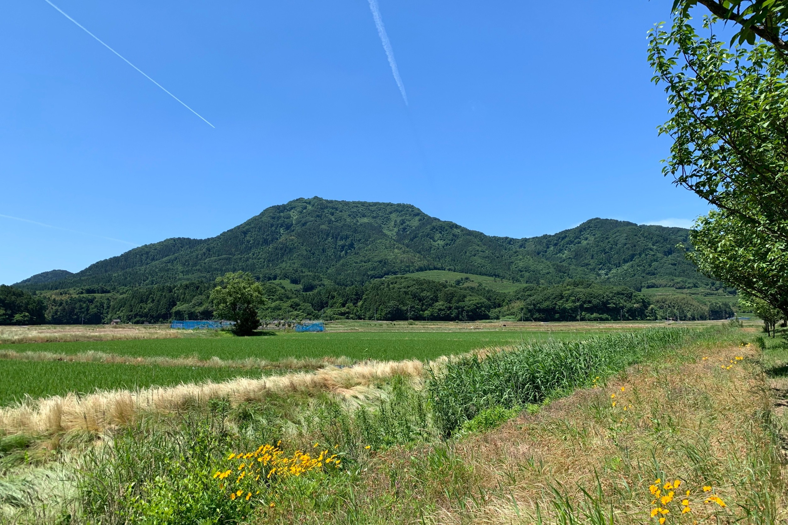 上堰潟公園から望む角田山（2020年6月）